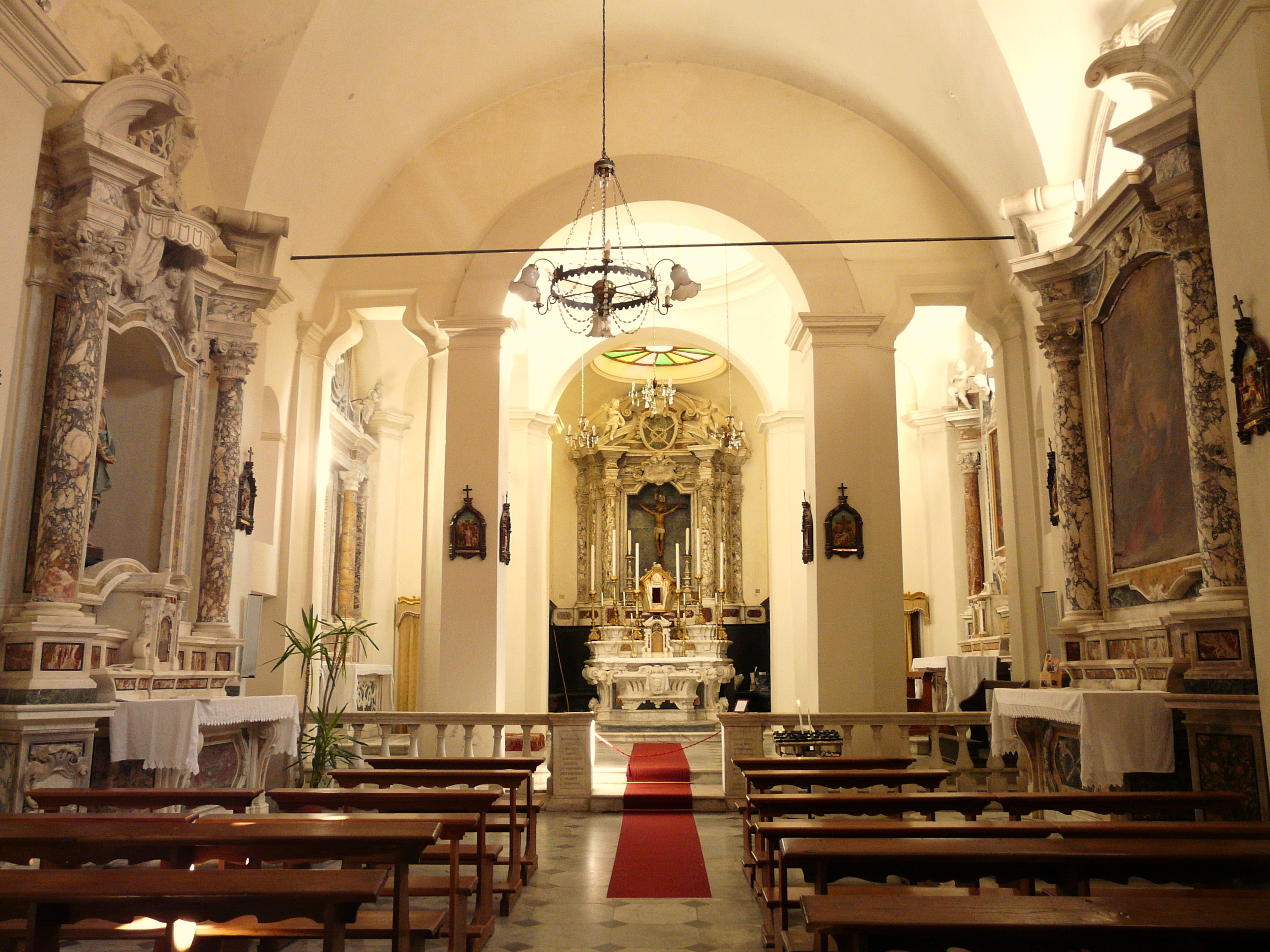 Chiesa-Santuario di San Remigio, Fosdinovo, Toscana, Italia